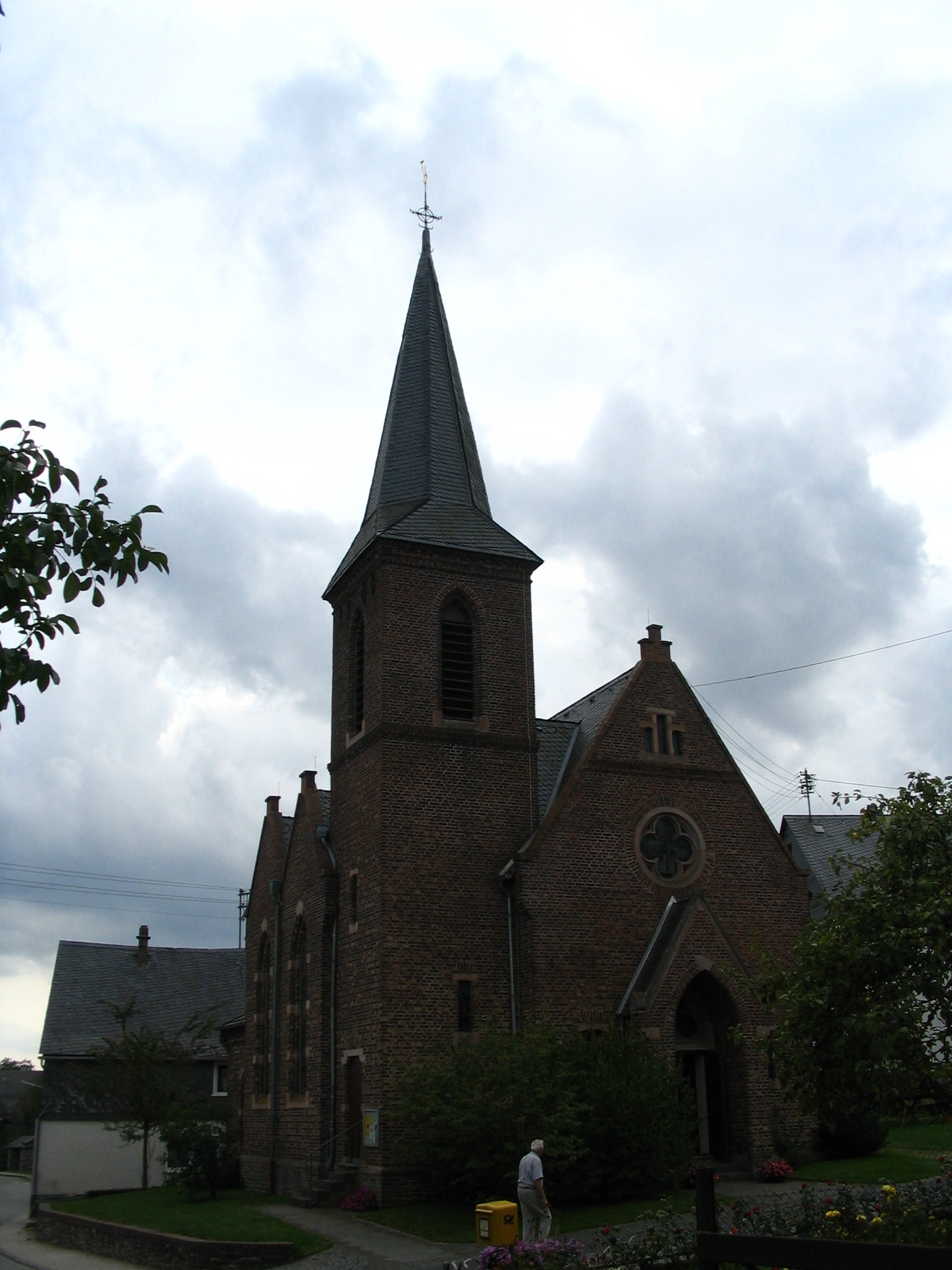 ev. Kirche Schönborn im Hunsrück